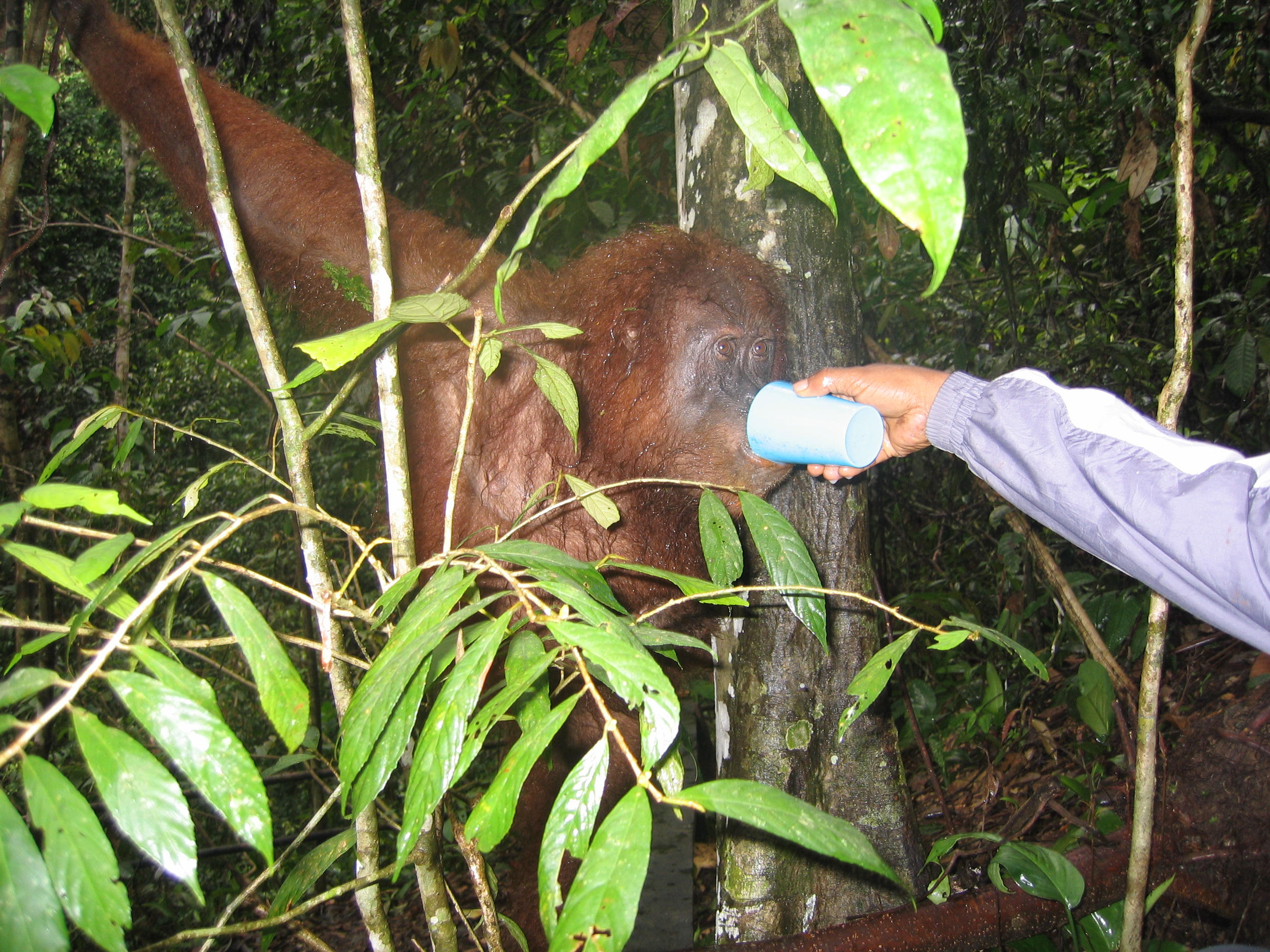 Fütterung eines Orang-Utan in Bukit Lawang, Nord Sumatra